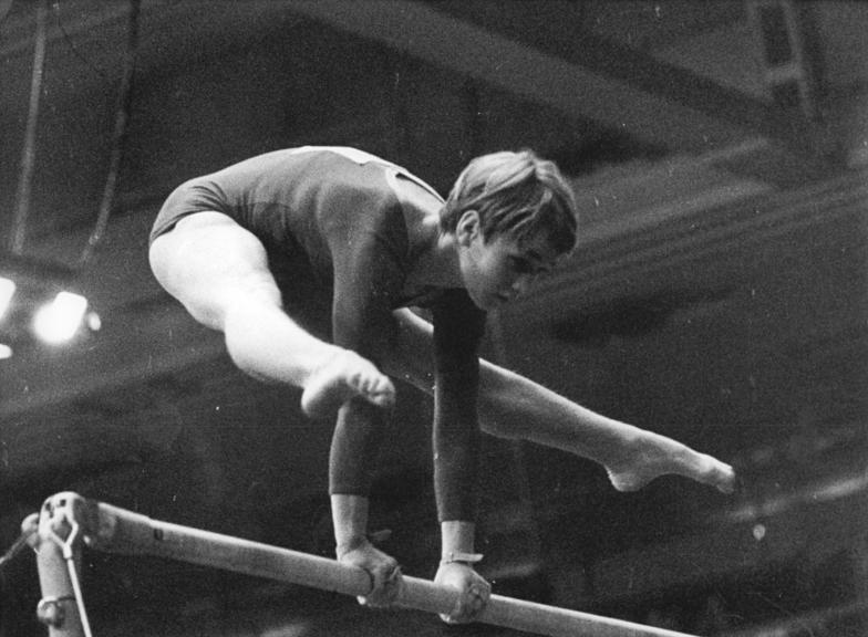 Zentralbild-Schaar-24.10.1970-tre-Ljubljana: XVII. Turn-Weltmeisterschaften. Am späten Freitagabend (23.10.) absolvierte unsere DDR-Riege der Frauen ihre Pflicht. Die sechs Mädchen erkämpften eine knappe Führung vor der Riege der UdSSR. Eine großartige Leistung zeigte Karin Janz, auch am Stufenbarren (unser Foto), die im Einzelklassement zur Zeit mit Erika Zuchold den 2. Platz einnimmt (beide 38,15 Punkte).